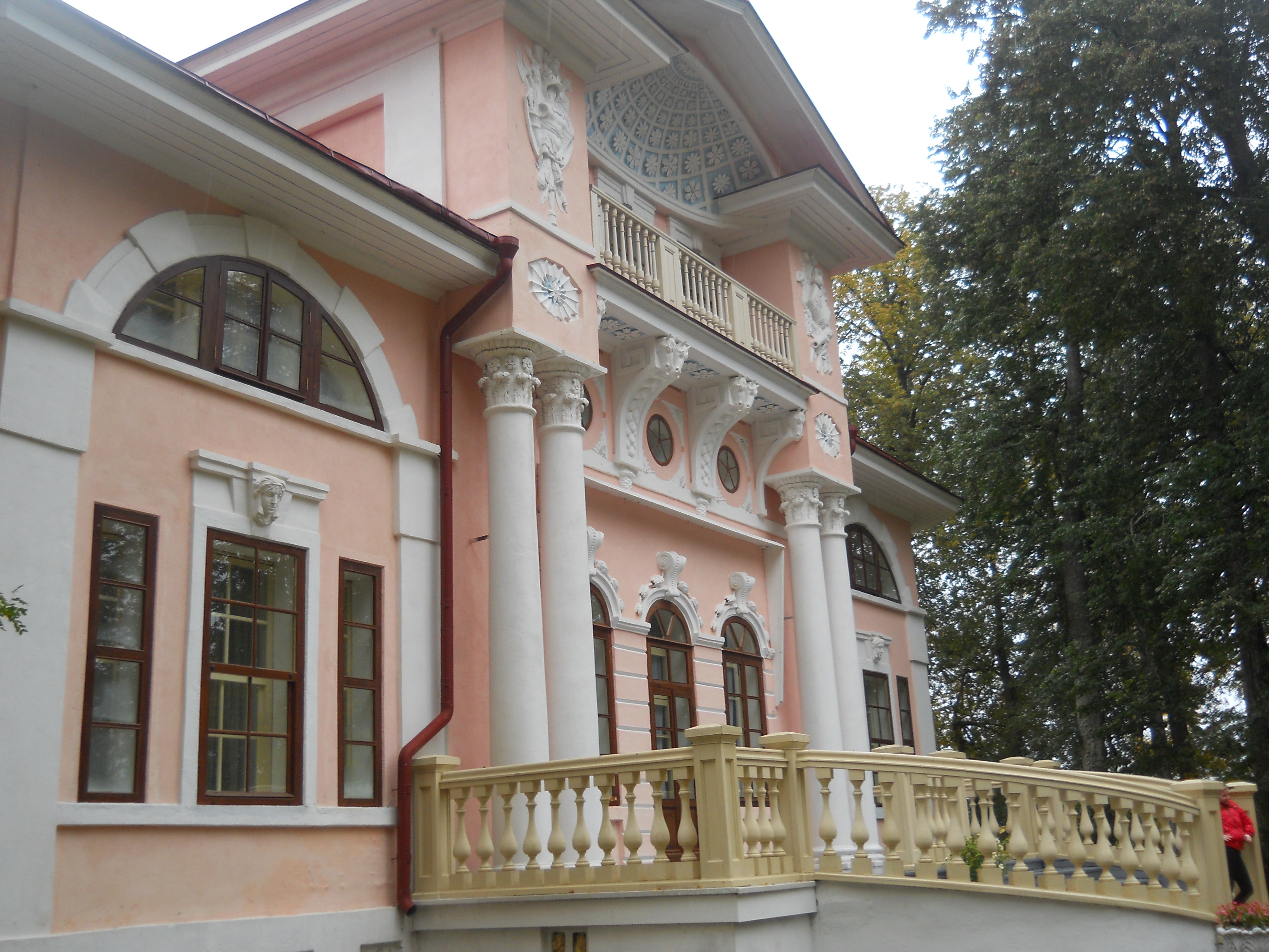 (Вологодская область, Вологда, село Покровское)